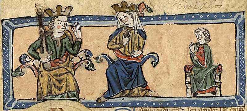 Alfons X. s manželkou Violantou